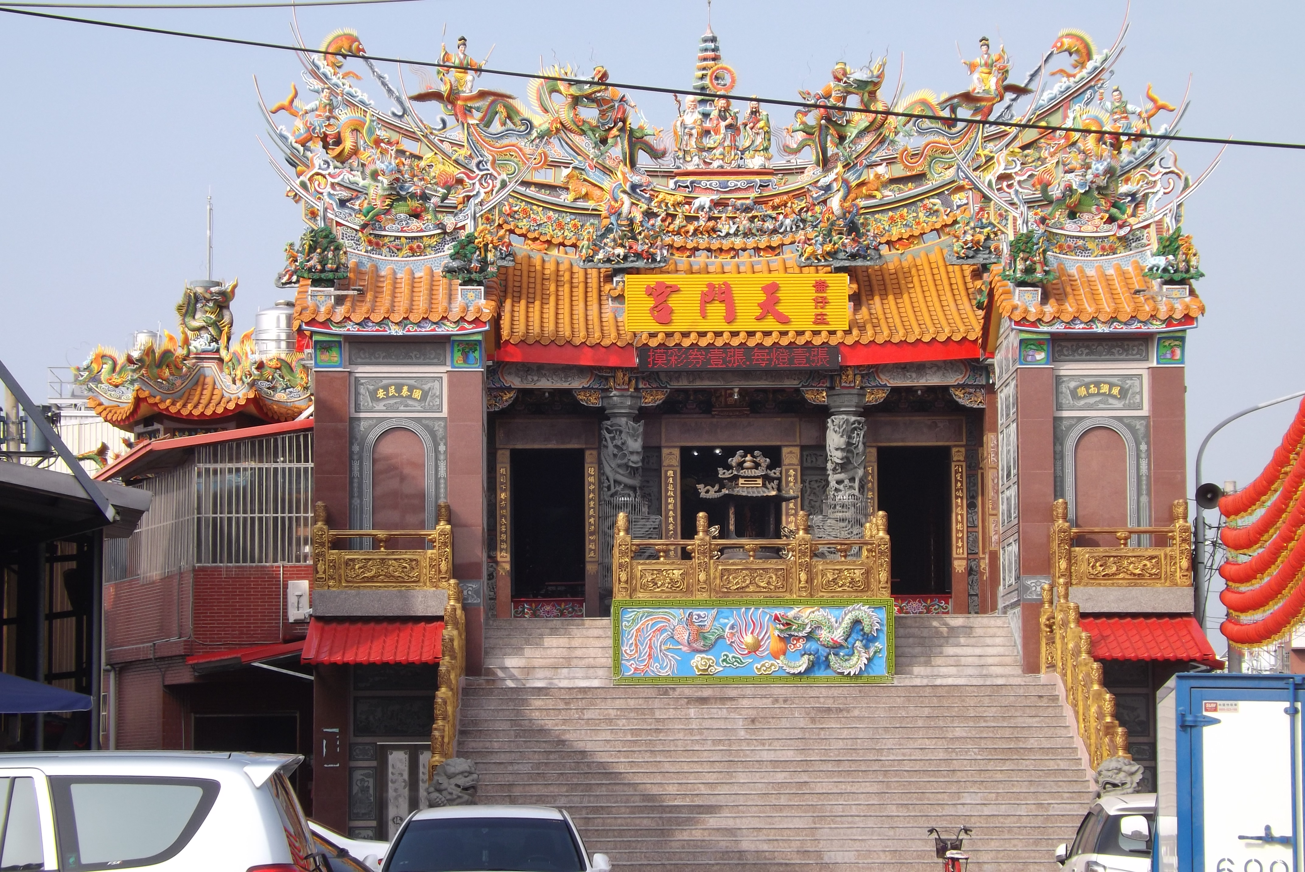 崙仔庄天門宮